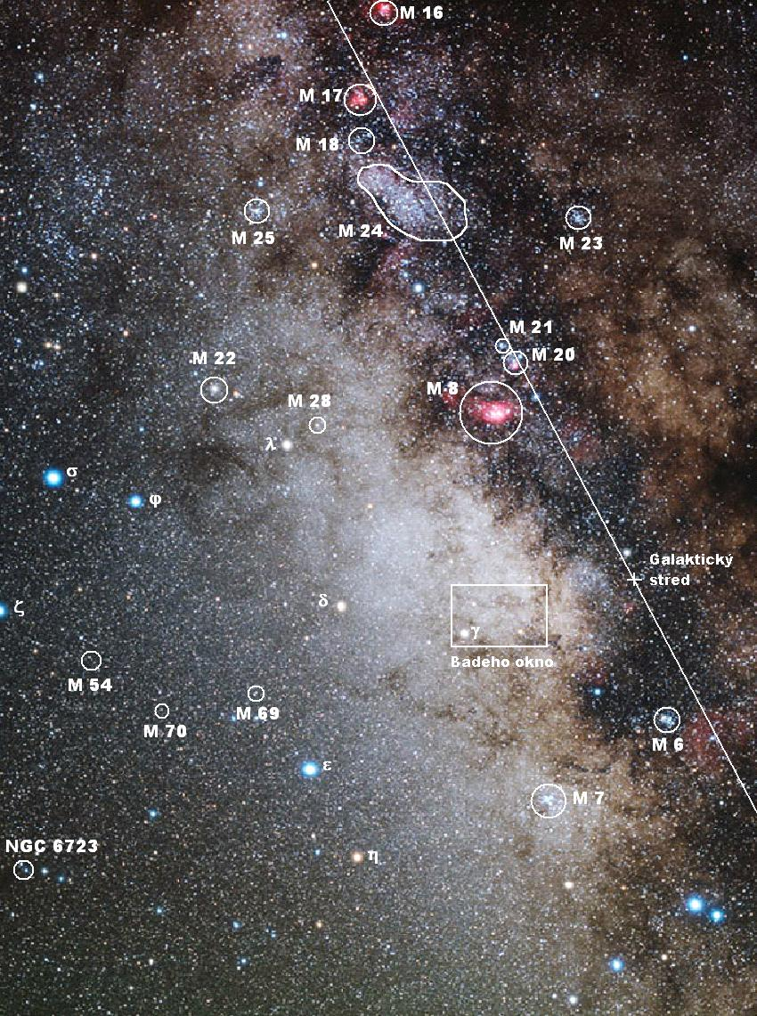 Dlho exponovaná snímka súhvezdia Strelec (Sagittarius) s popisom objektov.